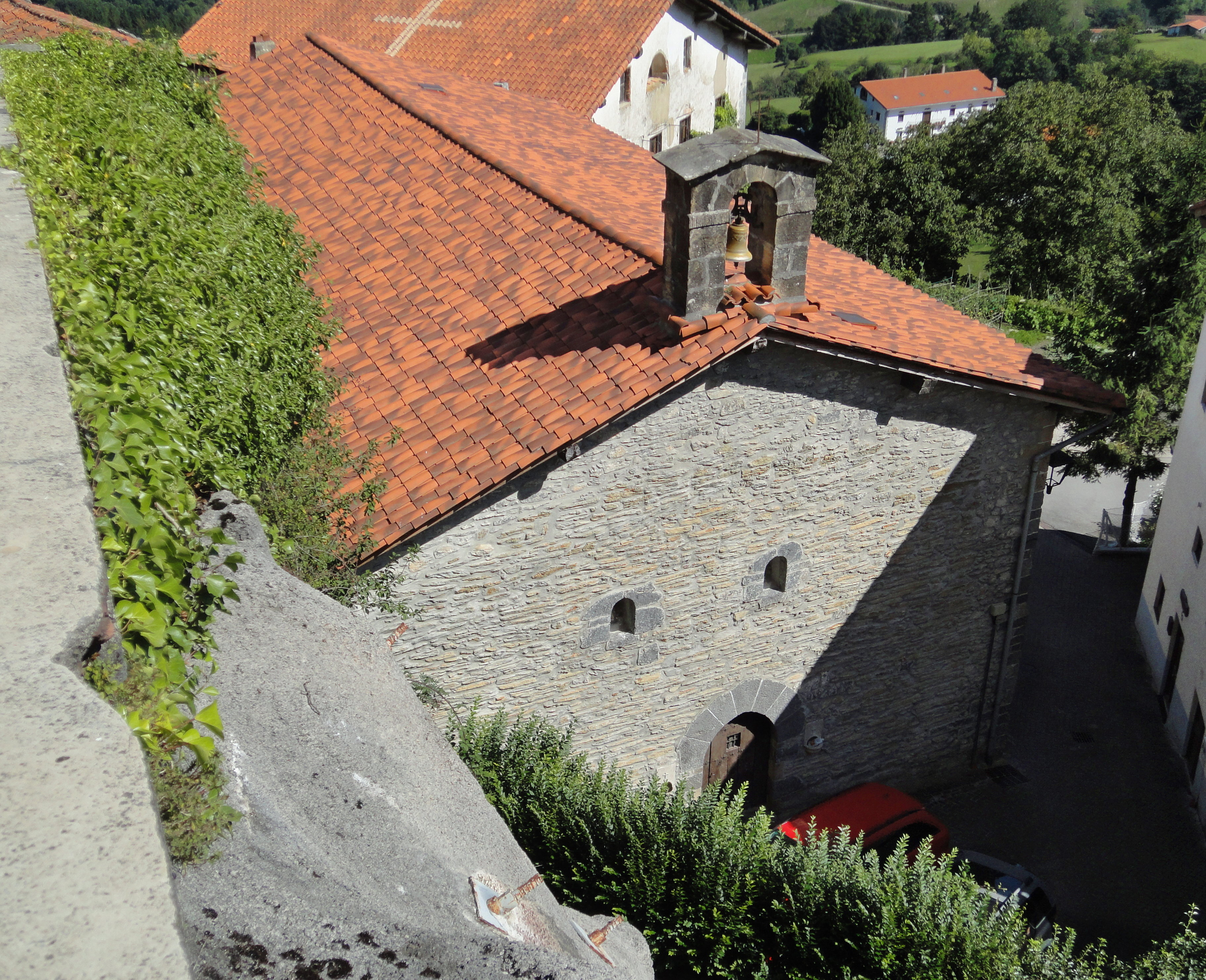 Aizpeako Andra Maria - Aia